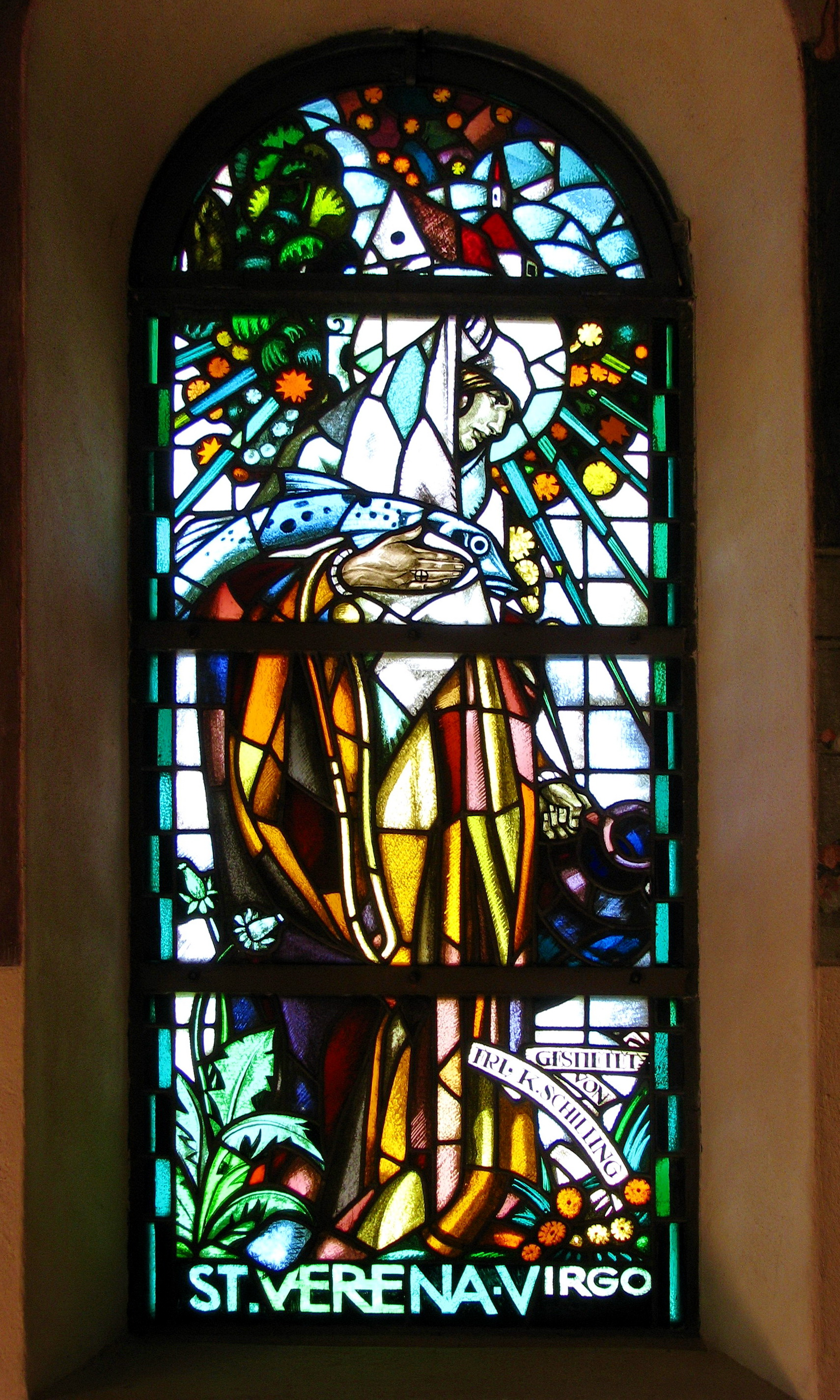 Kloster Fahr in Würenlos